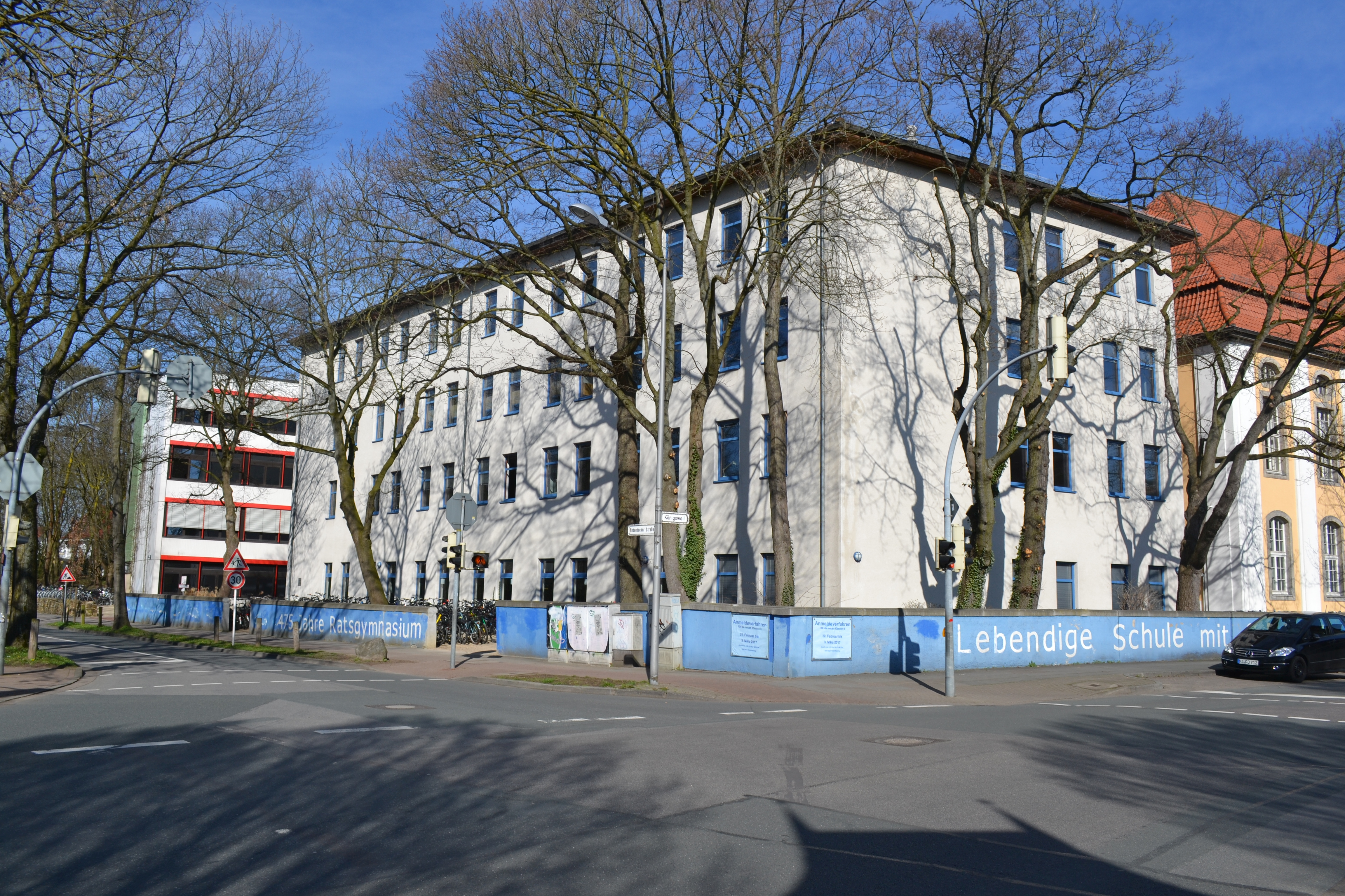 Das ratsgymnasium in Minden, Blick von Südost auf die Schule, vorne der Neubau.